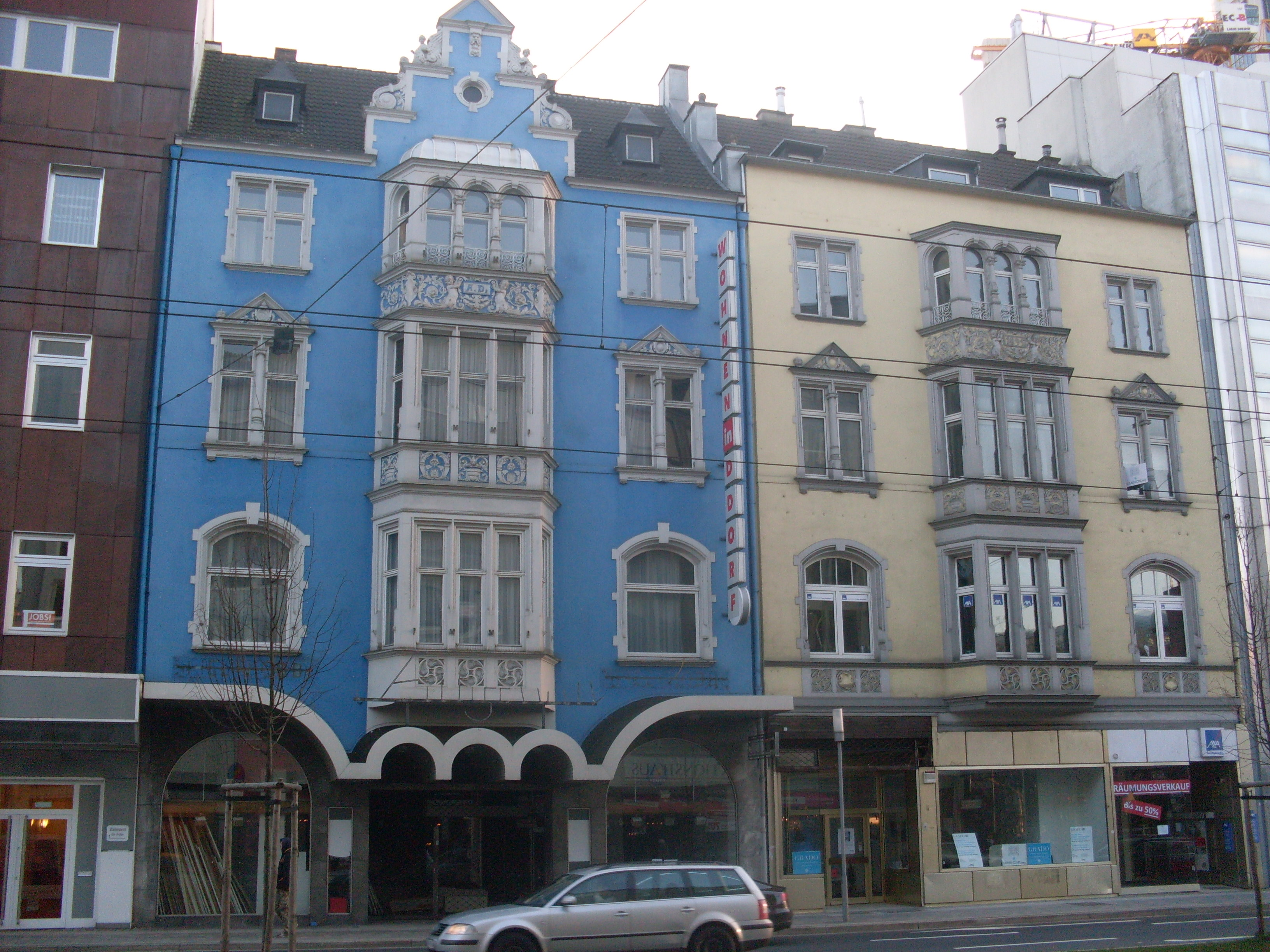 Denkmalgeschützte Häuser in Düsseldorf, Graf Adolf-Straße 11 und 15